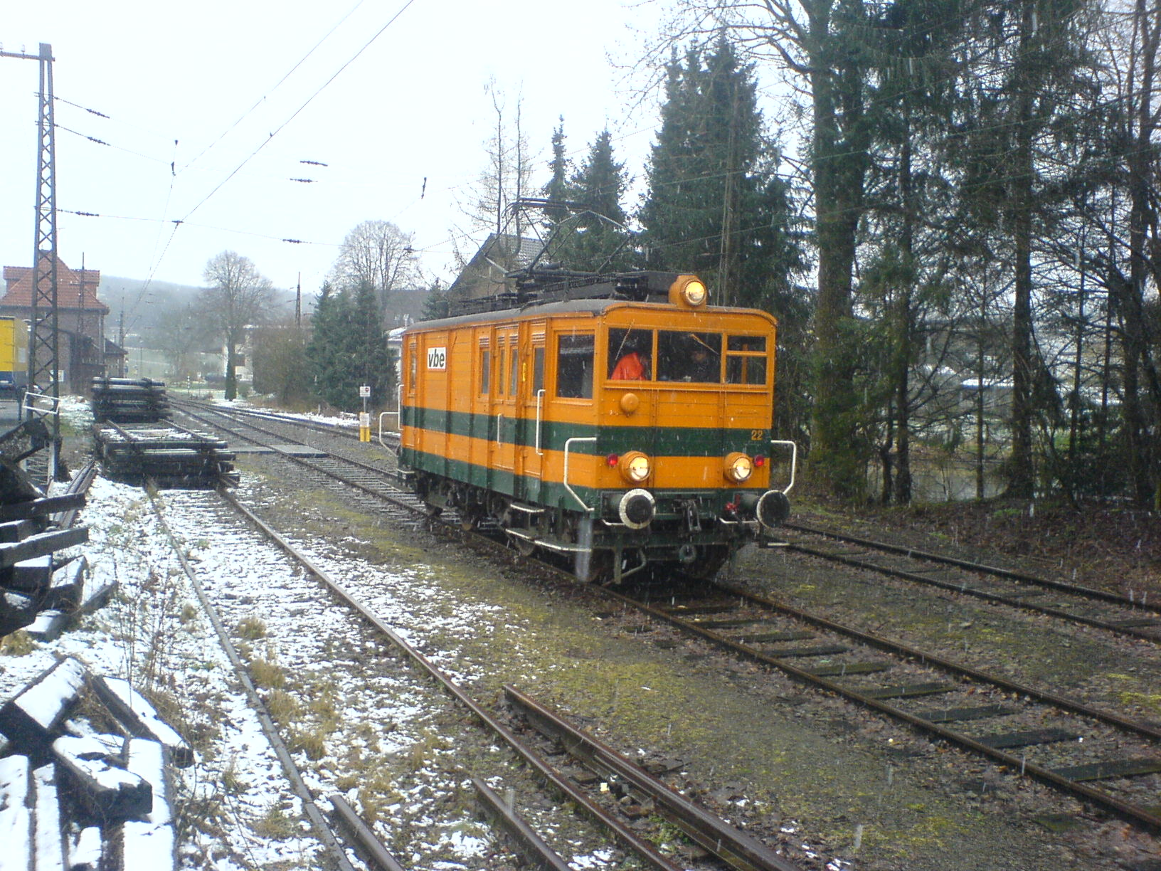 E22 der Verkehrsbetriebe Extertal (VBE) bei leichtem Schneefall im Bahnhof Alverdissen